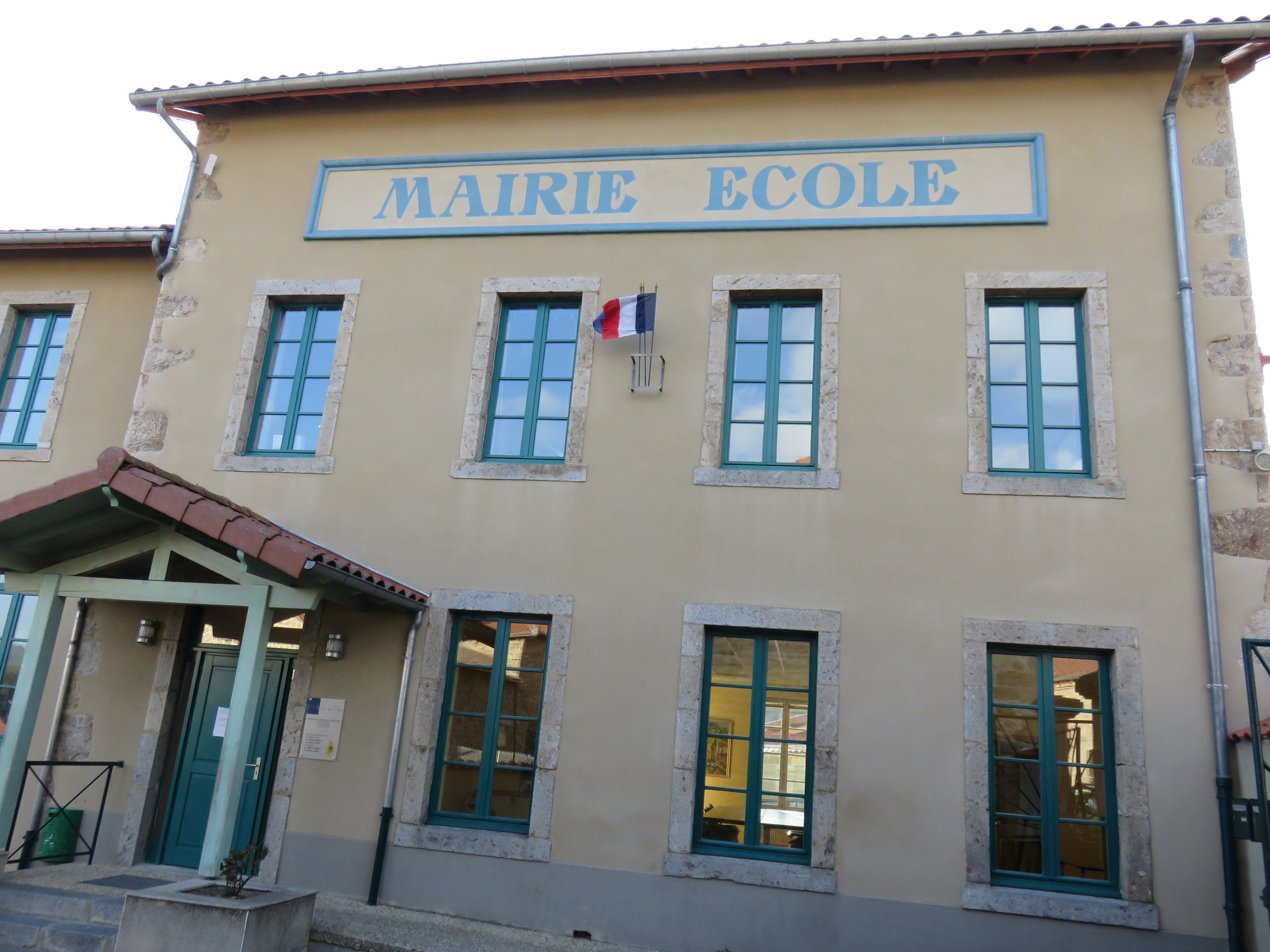 Mairie-école de Saillant (Puy-de-Dôme, France).